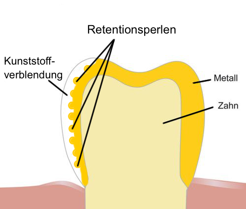 Metallkrone mit Kunststoffverblendung, die an Retentionsperlen haftet